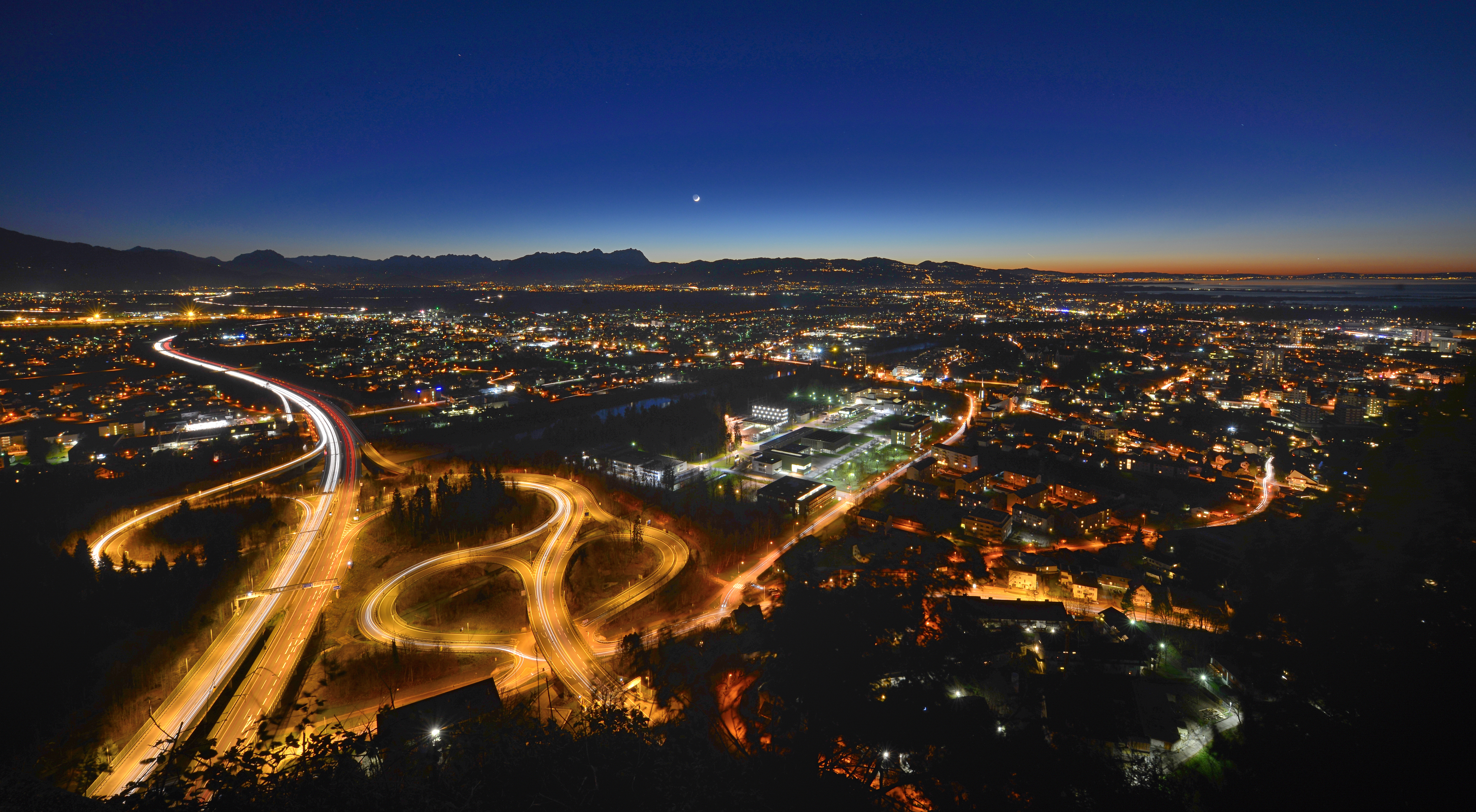 Rheintal/Walgau Autobahn, A14 . Verkehrsknoten Weidach bei Bregenz. Aus-Einfahrt zum Pfändertunnel links sowie rechts der Citytunnel. Diagonal verlaufend die Bregenzerache; Bildmitte das Kraftwerk Rieden mit dem Werksareal der Vorarlberger Kraftwerke. Rechts der Bodensee. Das Gebirge am Horizont gehört zum Alpstein und der Alviergruppe im Kanton St. Gallen. Blick von der Burg Hohenbregenz auf dem Gebhardsberg .